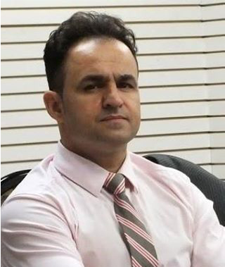 Haroon Rahoon